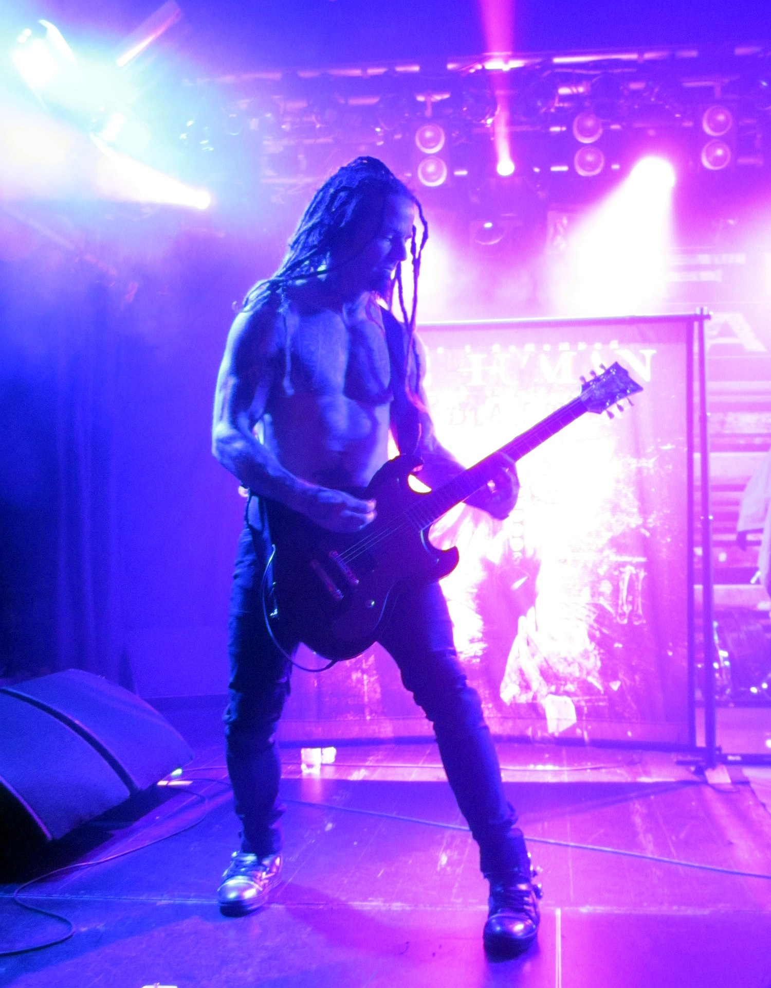 Logan Mader live bei einem Konzert mit seiner Band Once Human im Colos-Saal, Aschaffenburg